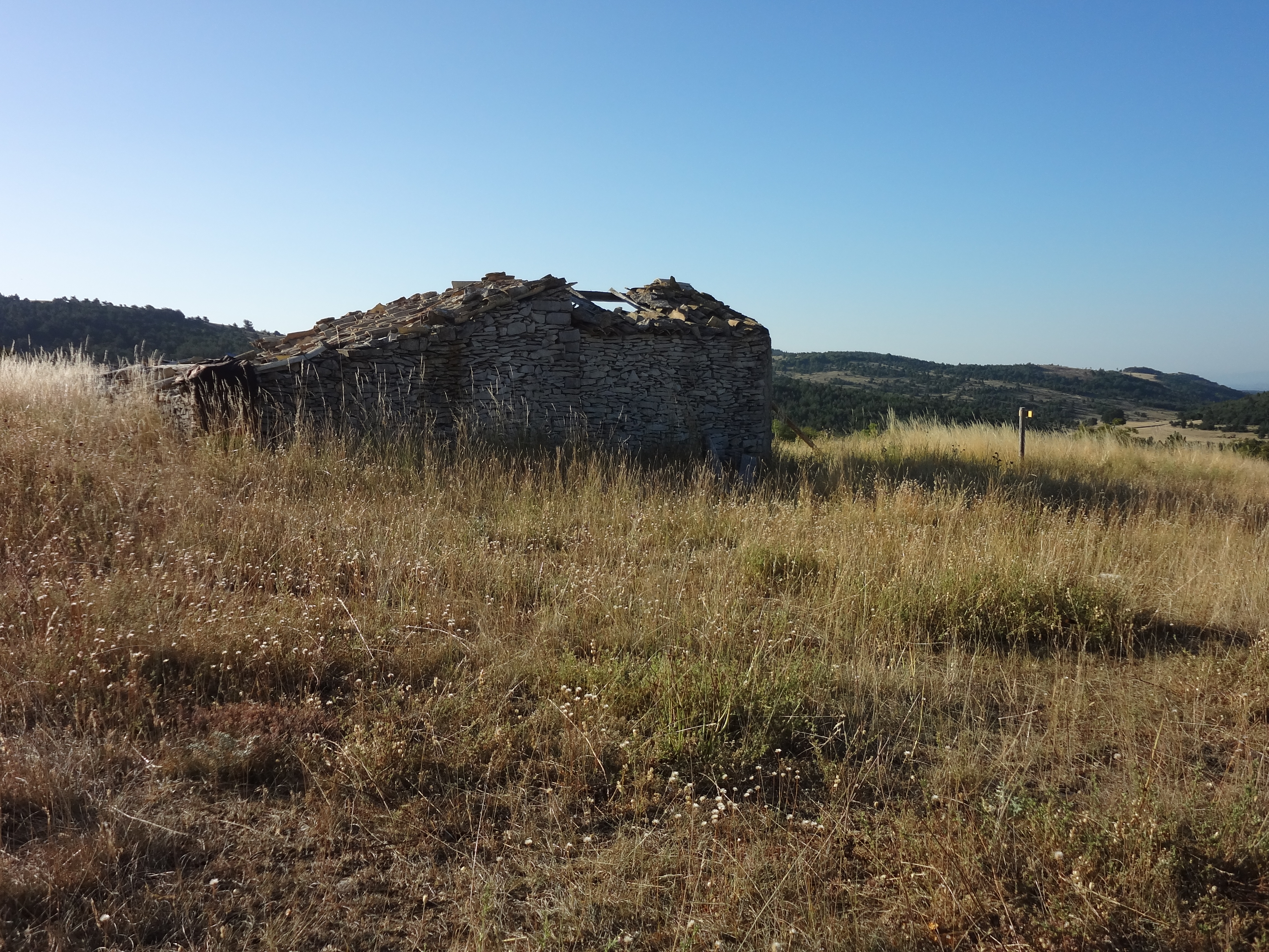 Jas des Agneaux à Redortiers